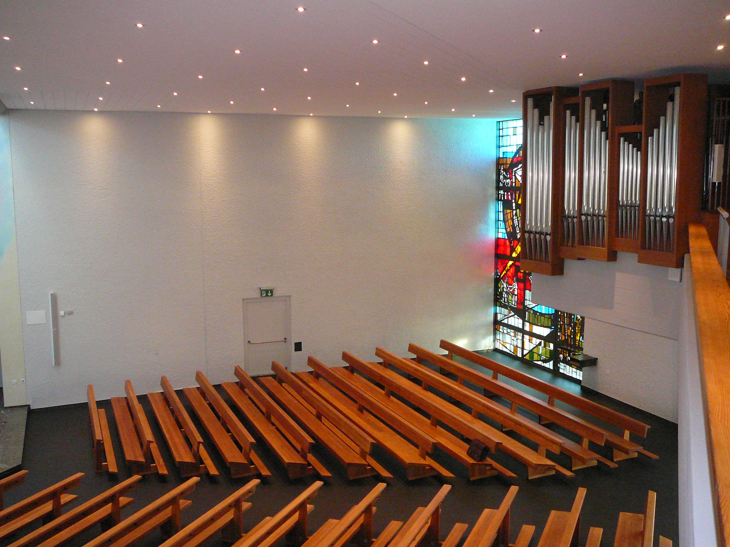 Römisch-katholische Pfarrkirche Bruder Klaus Urdorf, Innenansicht